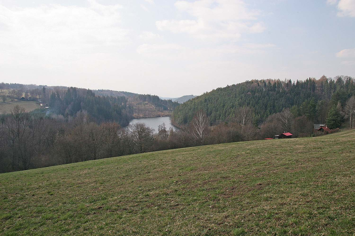 Dam Křižanovice, district Chrudim, Czech Republic, view of Hradiště autor: Prazak date: 1. 4. 2007